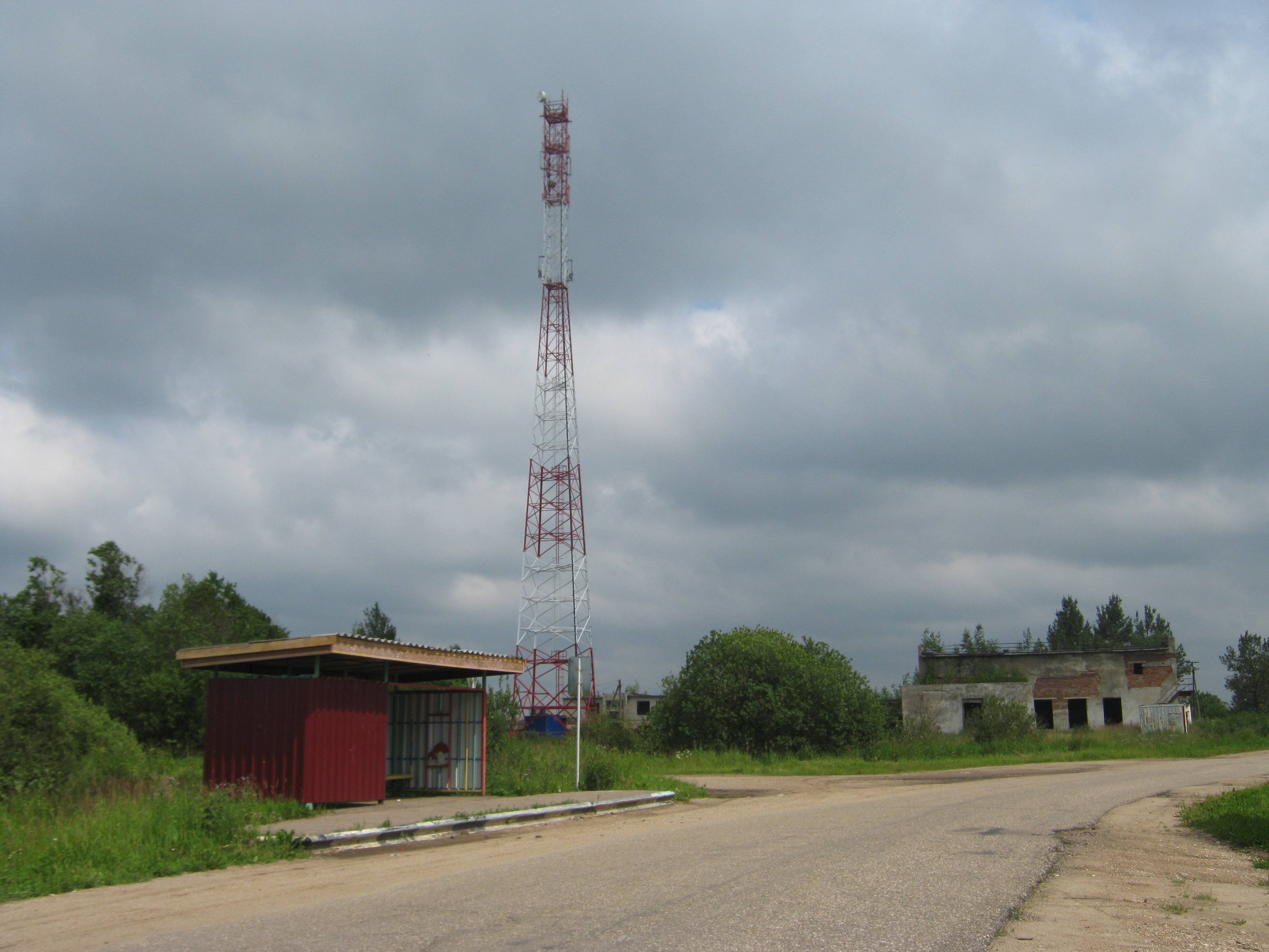 Центр деревни Петушки Гагаринского района Смоленской области